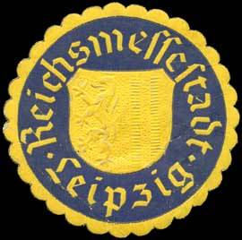 Sealing stamp Title: Reichsmessestadt - Leipzig Description: gelb, blau, geprägt Place: Leipzig size: 4 cm